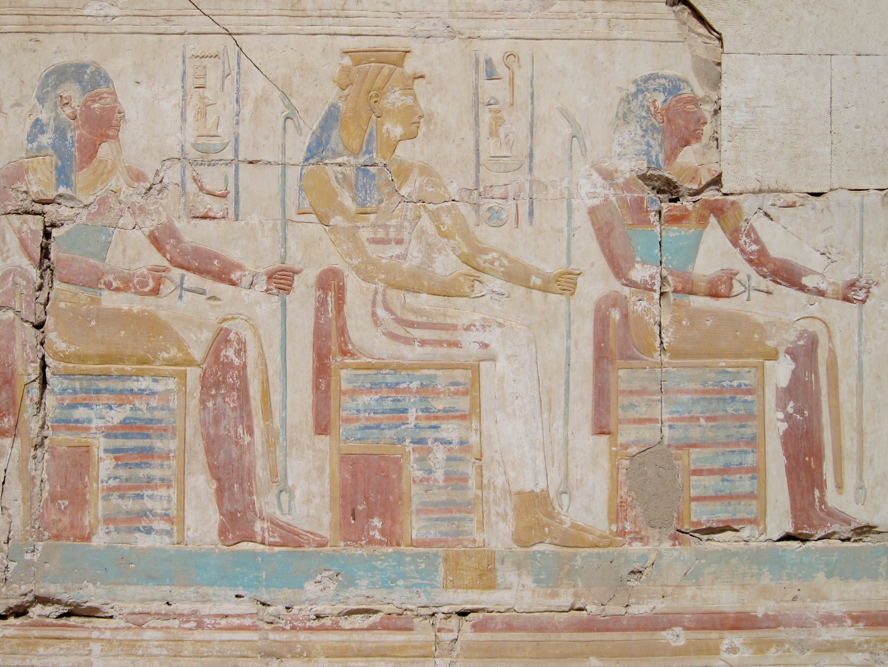 Relief im Tempel Ramses II. in Abydos, Ägypten